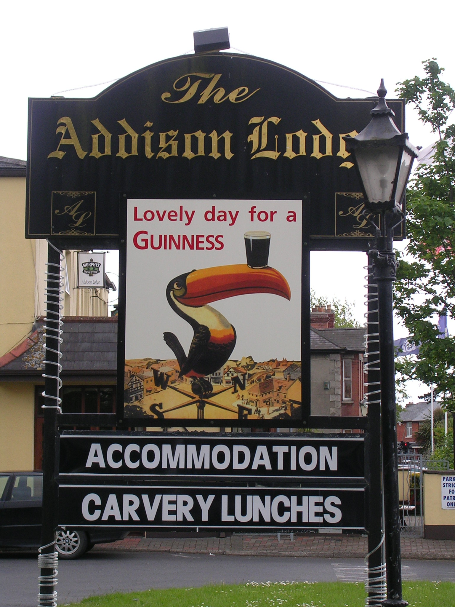 Publicité ancienne pour la bière Guinness. Photo prise par Jibi44 à Dublin, Irlande, en mai 2006.